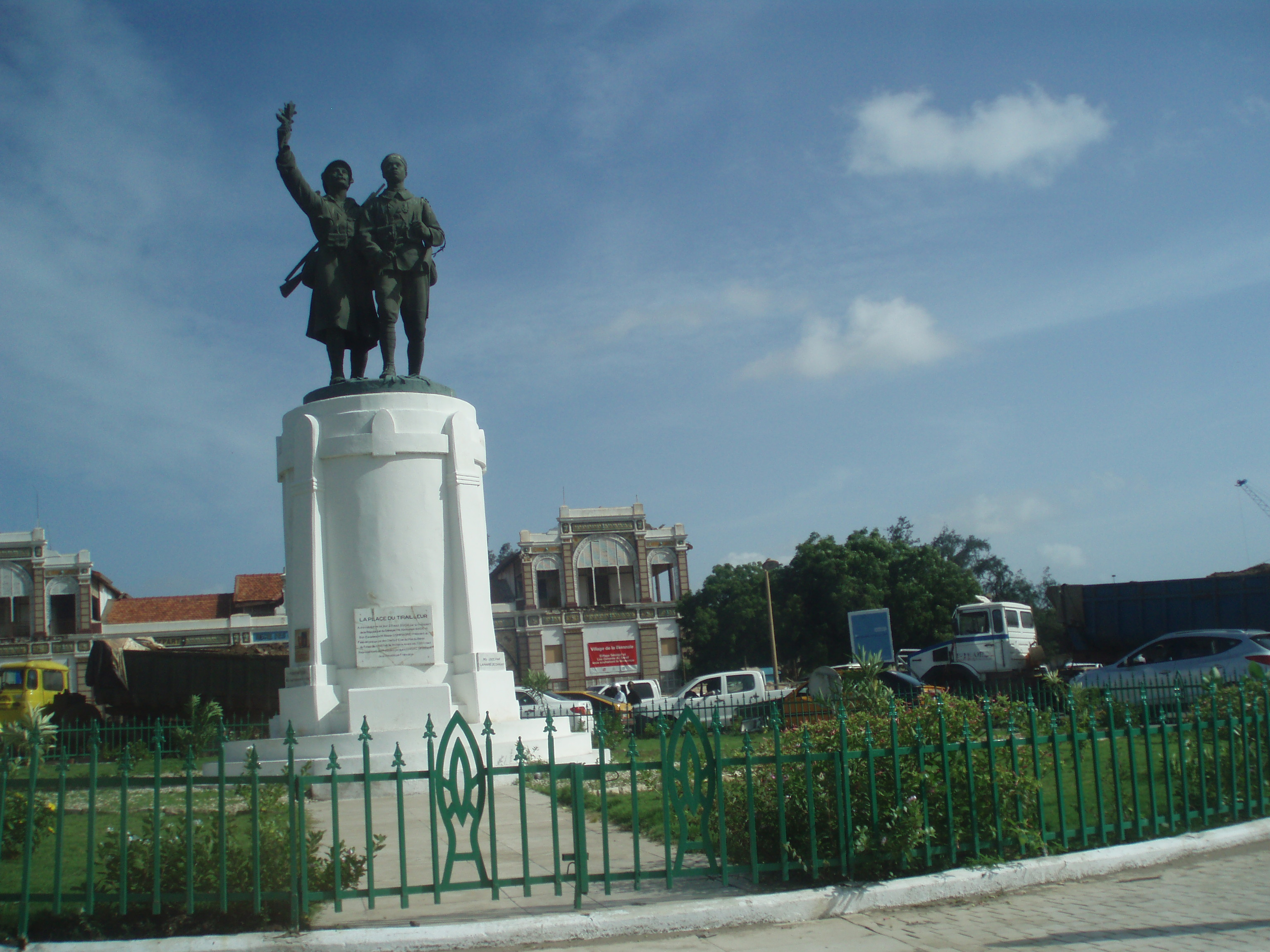 Plaza de Tirailleur, Dakar (Senegal). Ibamos en coche a coger un ferry para ir a Isla Gorée, muy bonito.